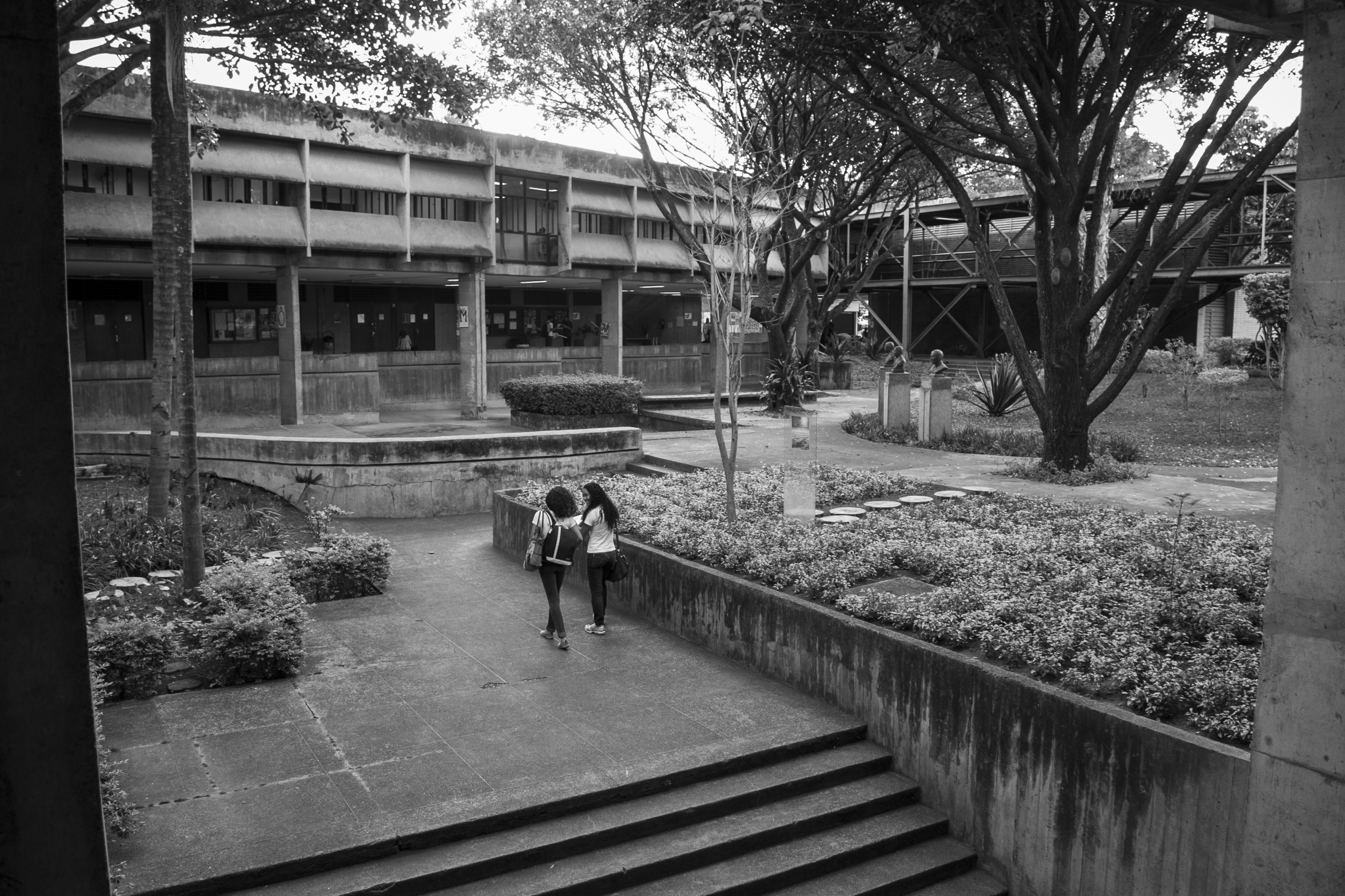 Foto: Luiz Filipe Barcelos/Secom UnB